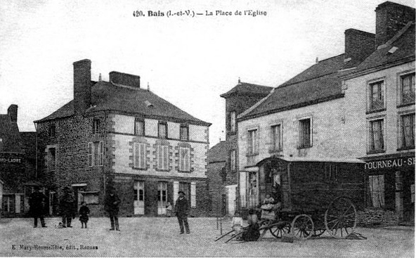 Bais (Ille-et-Vilaine) : la place de l'église vers 1920 (carte postale d'Edmond Mary-Rousselière)